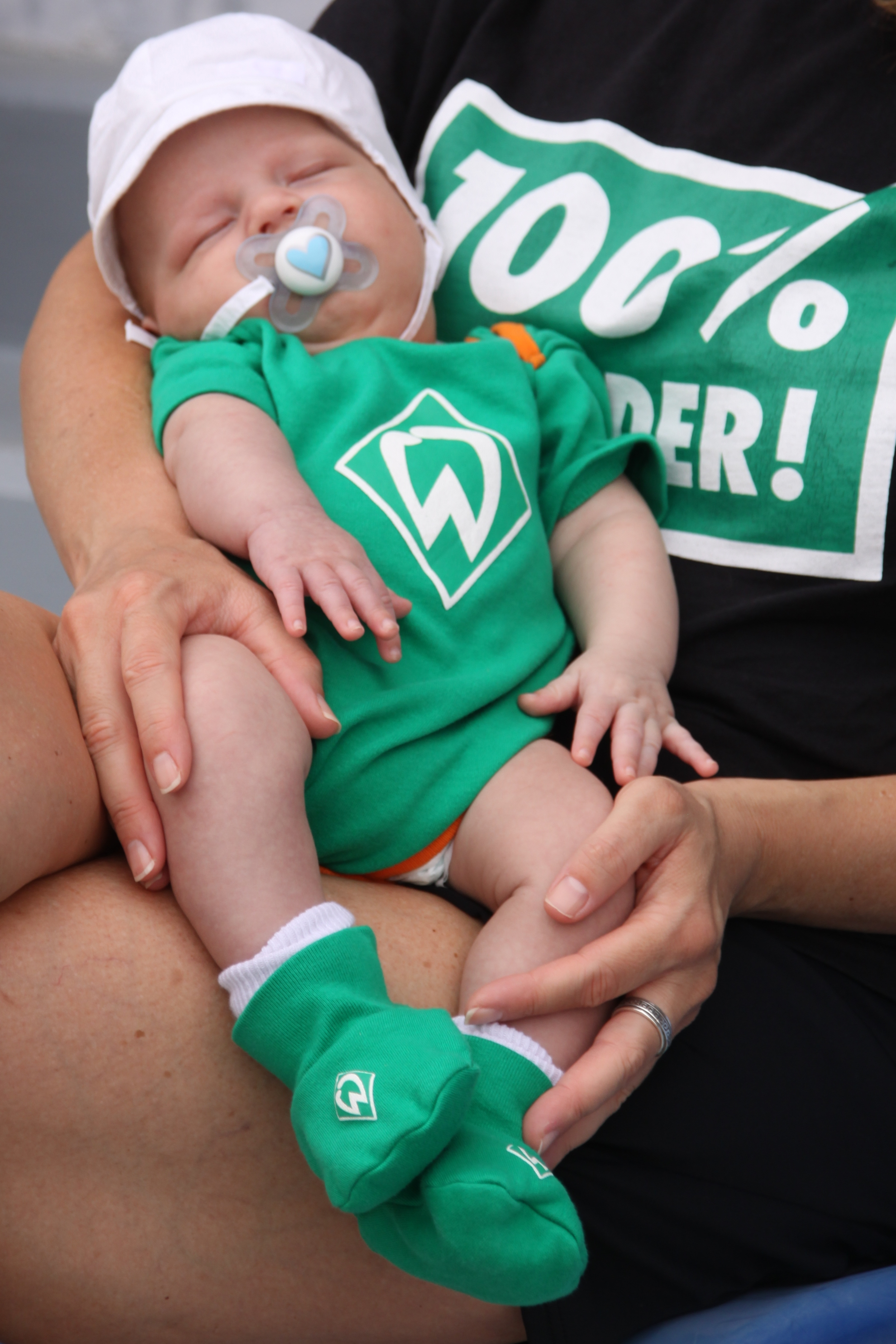 Einer der jüngsten Fans des SV Werder Bremen